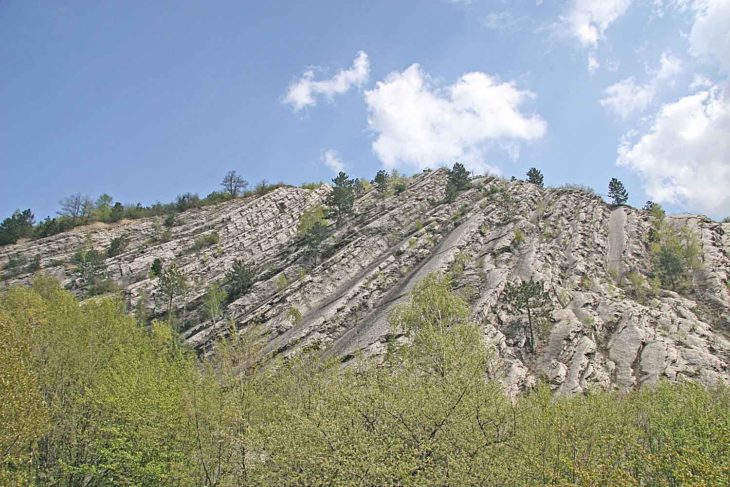 Přírodní památka Radotínské skály u Radotínské cementárny (název souboru je špatně)